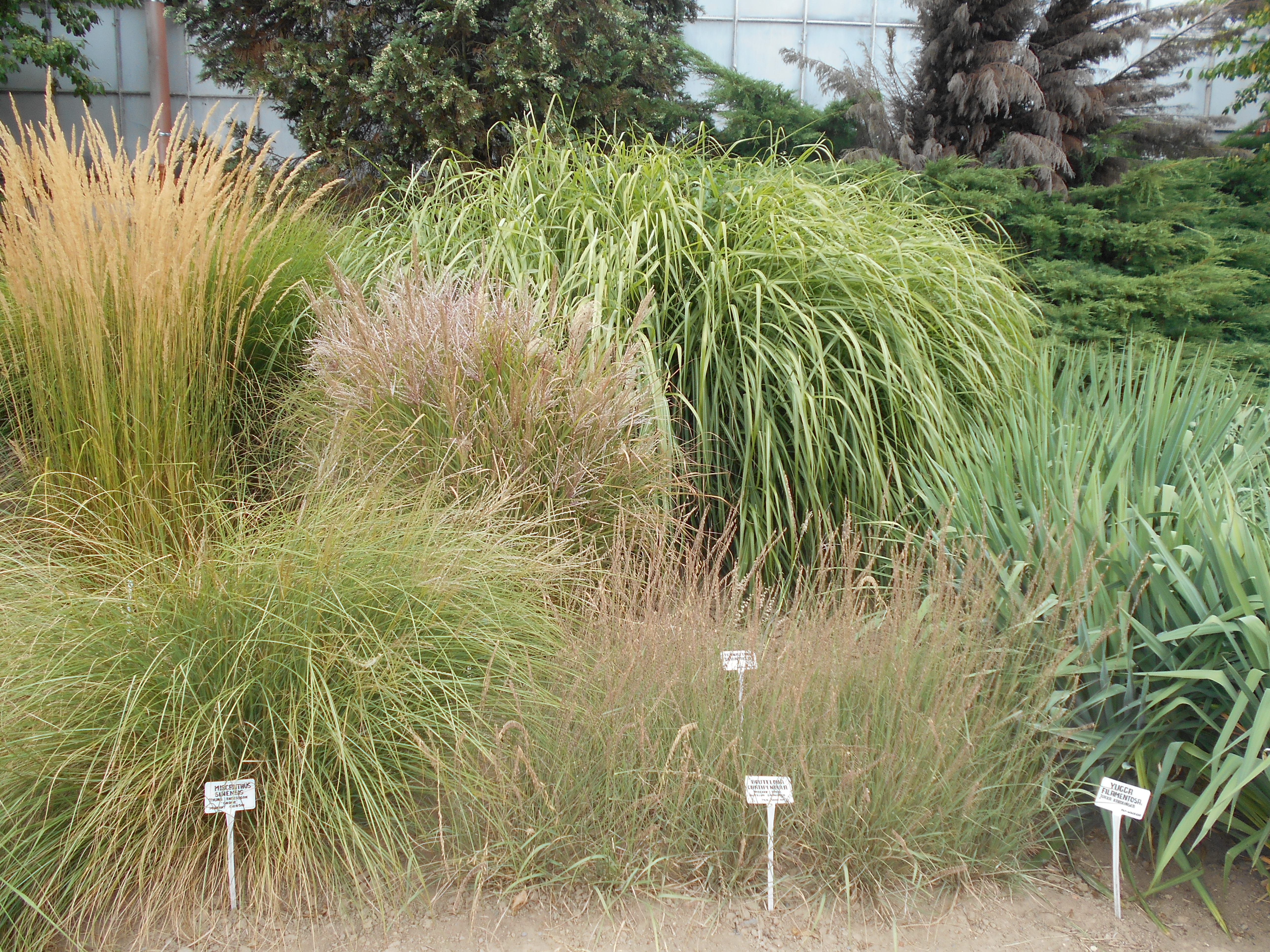 Kolekcja traw ozdobnych, Ogród Botaniczny UMCS w Lublinie.